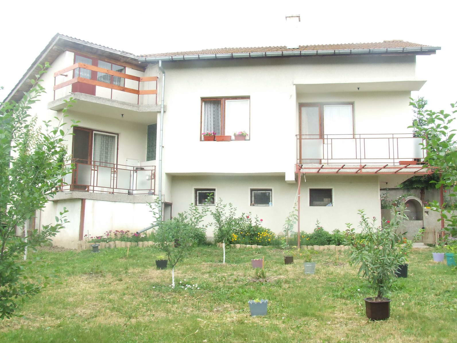 Съвременна къща от село Захари Стояново, Поповско - 2007 год.